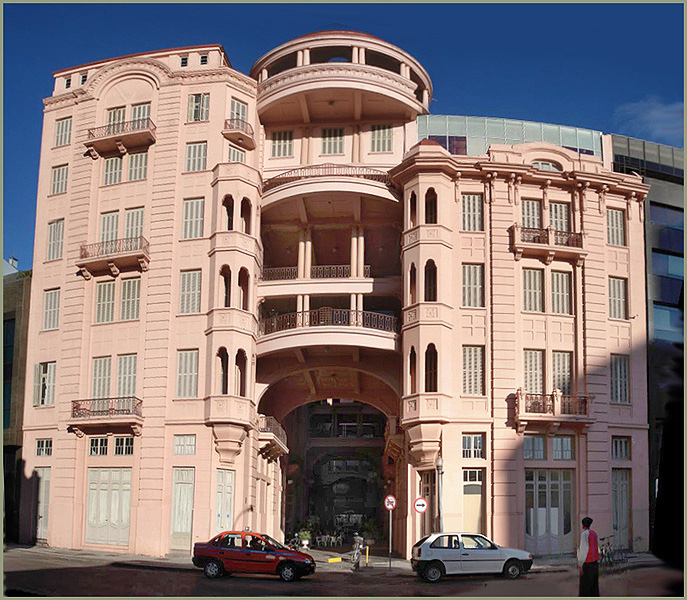 Fachada da Casa de Cultura Mário Quintana, Porto Alegre, Brasil. OBS: Não há recuo suficiente para uma captura total numa só foto, por isso a curvatura, artificial, decorrente do uso do software AutoStitch para compor esta fotomontagem com 8 imagens parciais